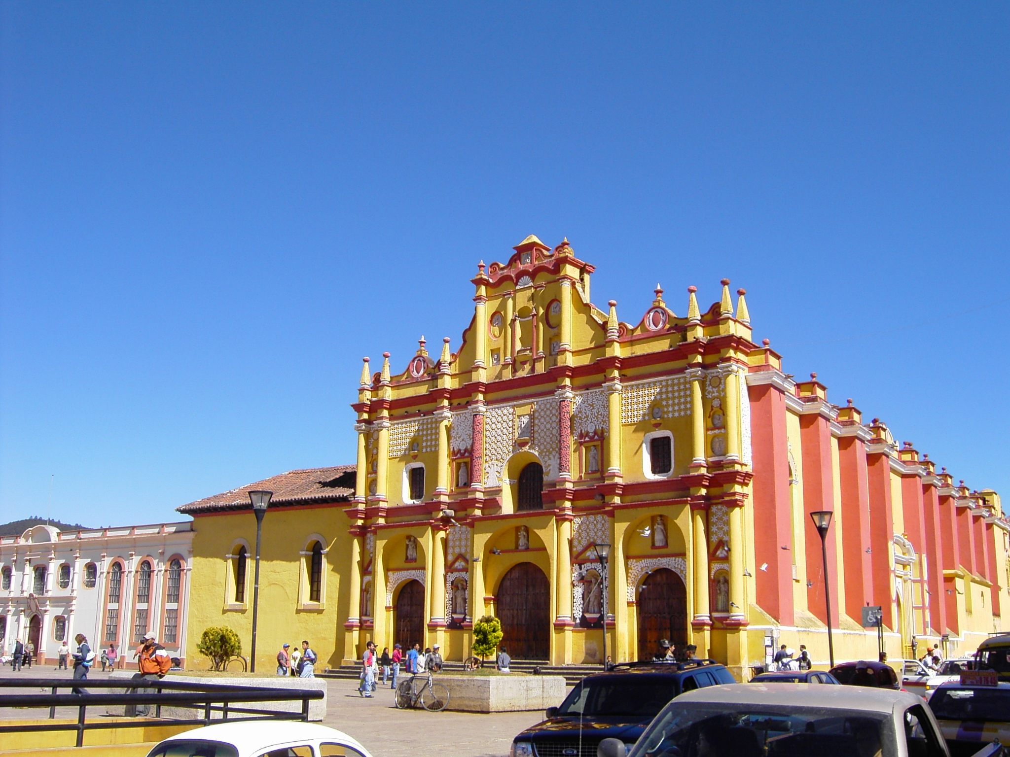 Die Kathedrale von San Cristobal, Mexiko.